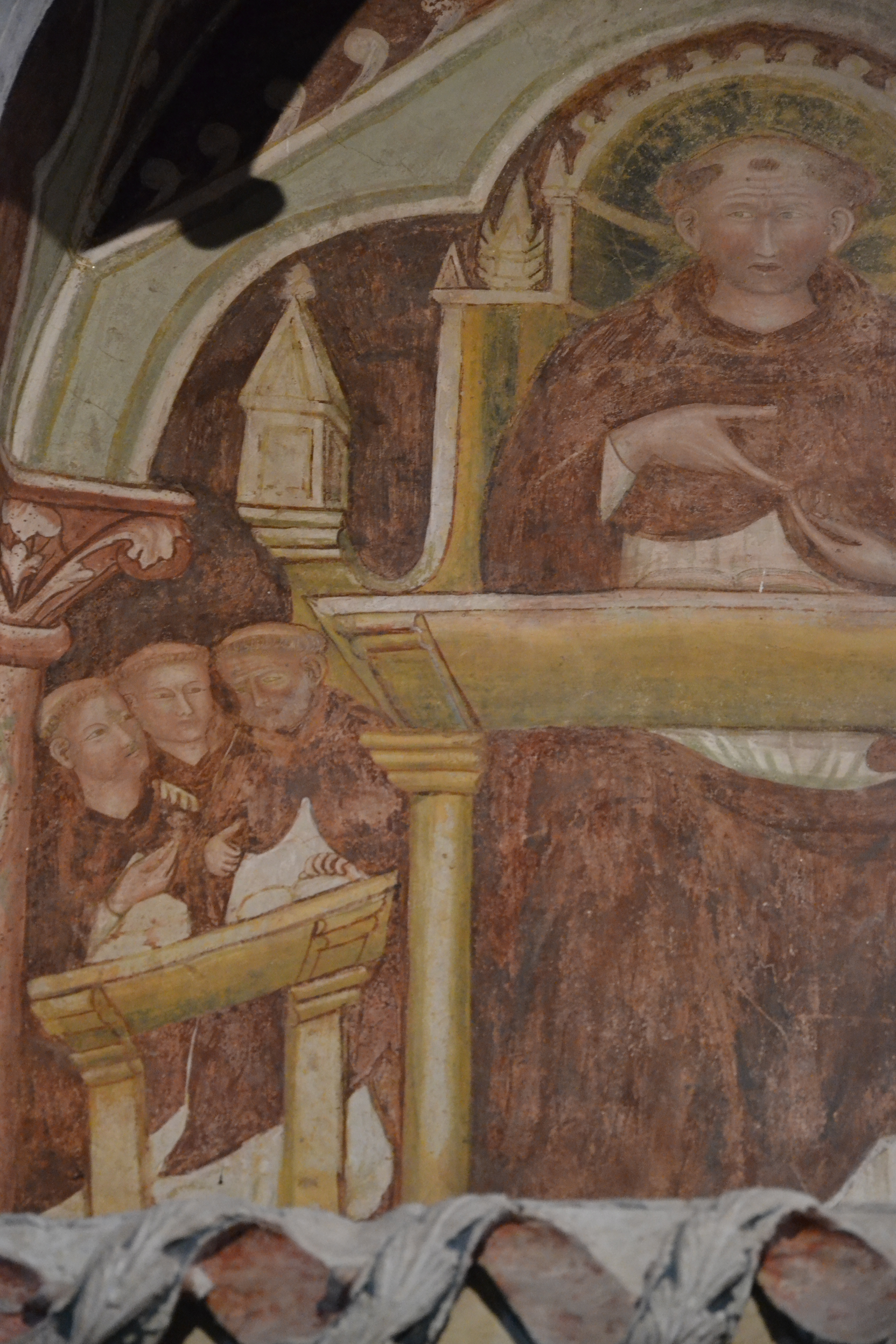 monumento funebre a Tommaso Gallo, XIV secolo. Affresco di scuola lombarda raffigurante l'abate Tommaso in cattedra This is a photo of a monument which is part of cultural heritage of Italy.